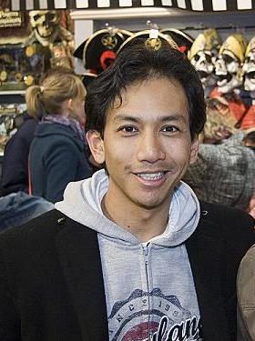 Wibi Soerjadi, Knipknipplakplak van een fanfoto (50px). Van de oorspronkelijke vrijgegeven fanfoto de fan afgeknipt.